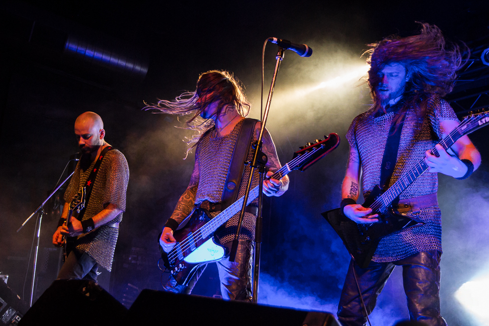 Helheim - Niflheim 2013 - 02-03-2013